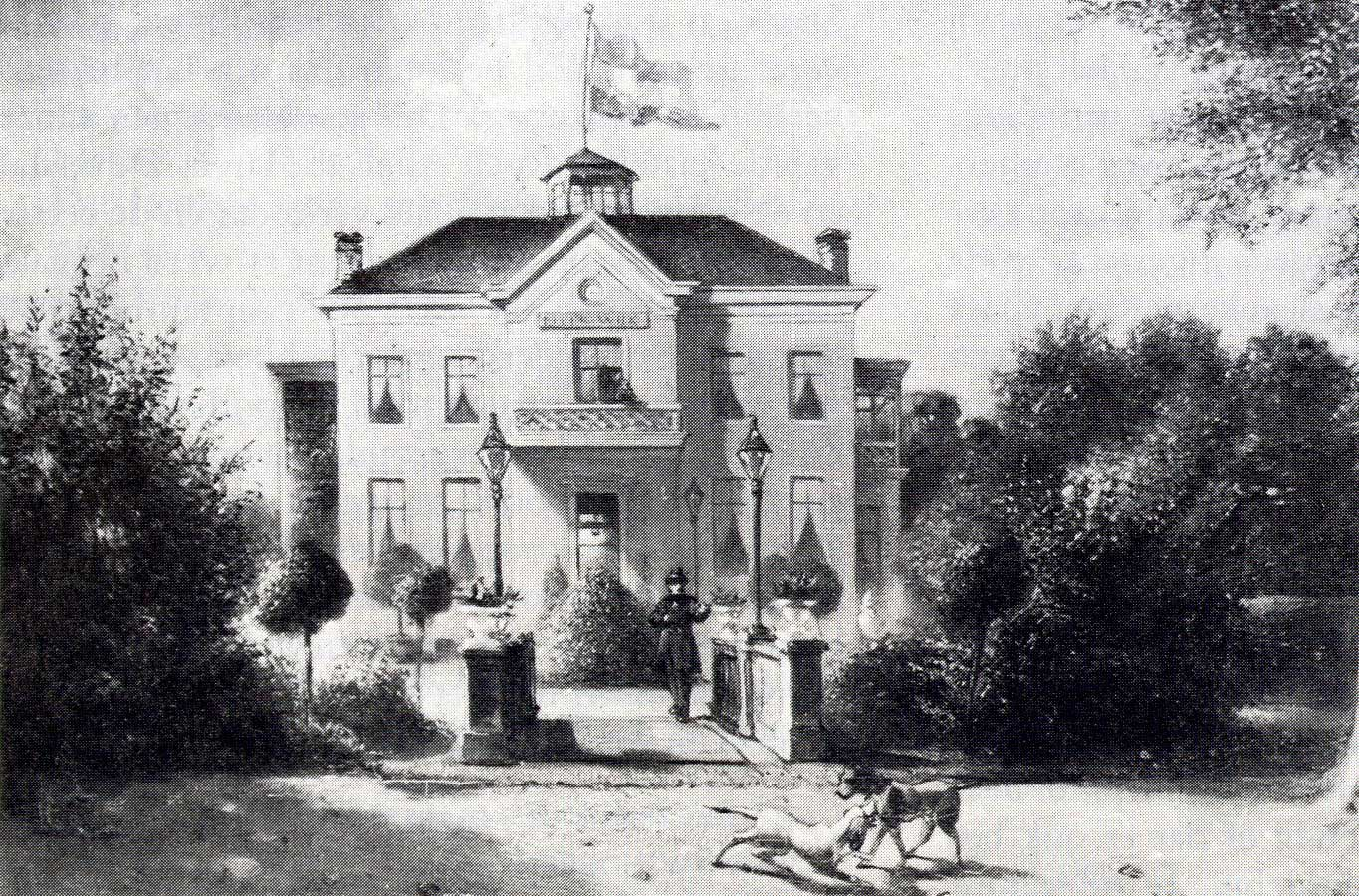 Meerwijk in Midlaren na de uitbreiding in 1861